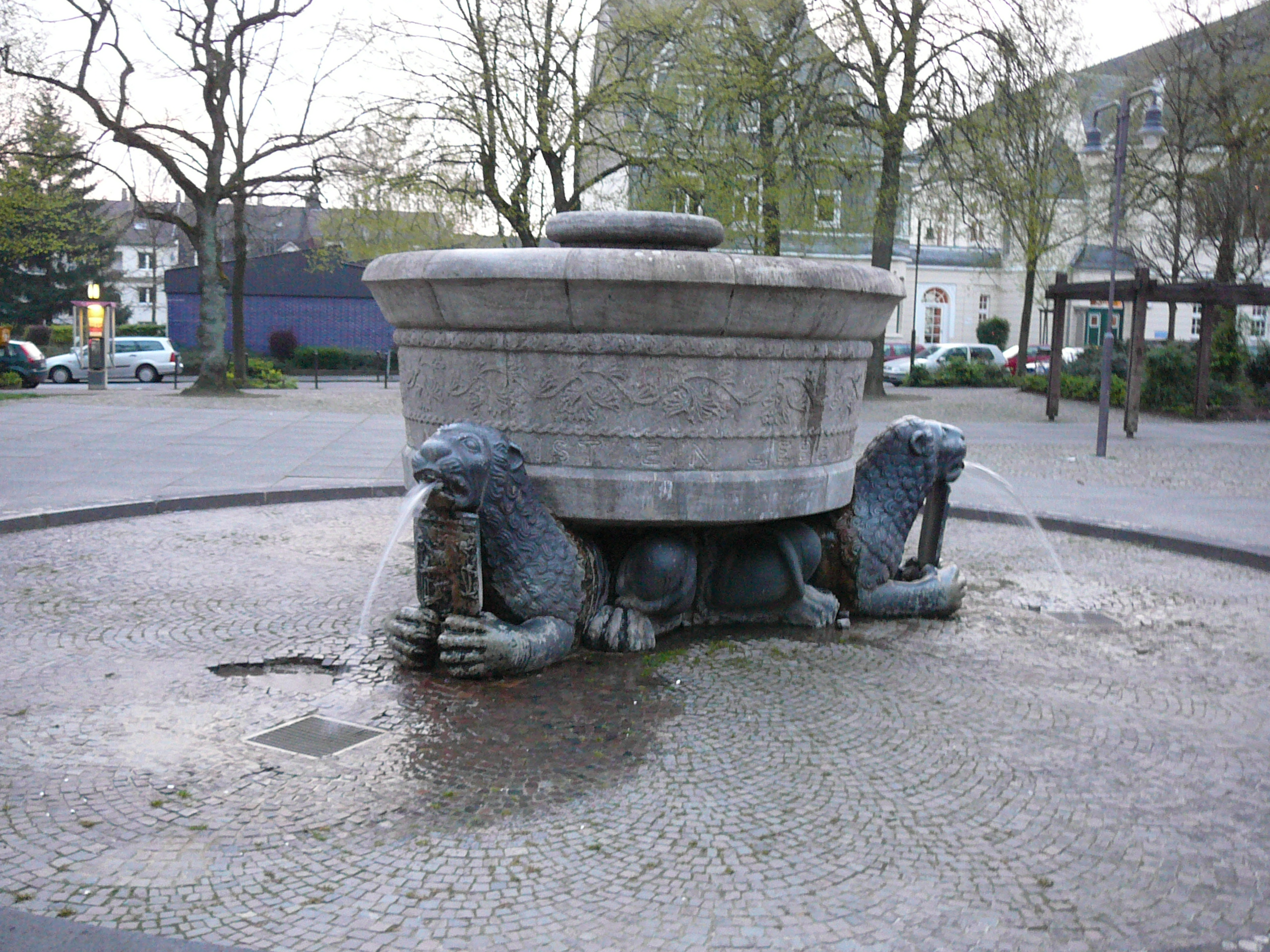 Platz der Republik, Wuppertal